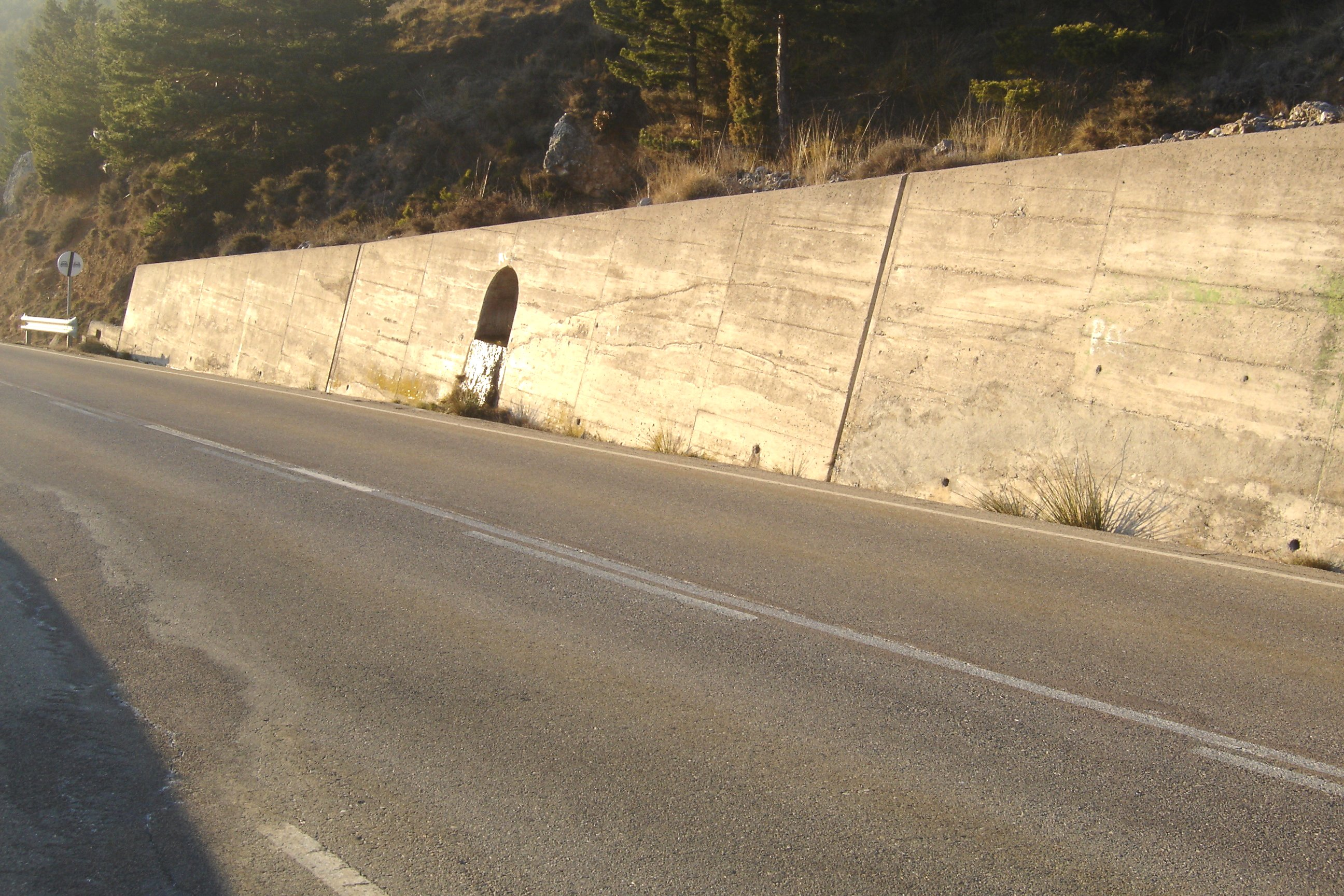 La font de Fenarals, al municipi de Guixers (Solsonès)